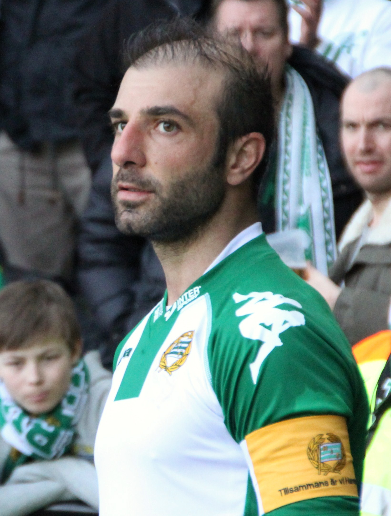 Hammarbys Kennedy Bakircioglu ska slå en hörna.